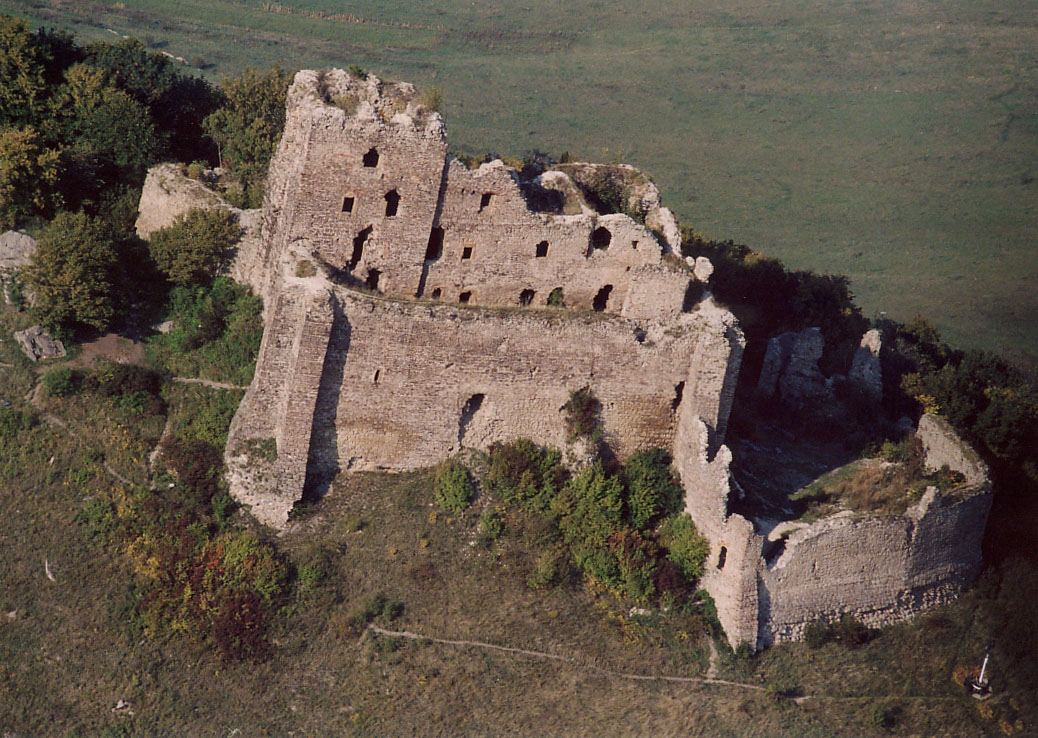 Castle - Kapi - Slovakia - Europe